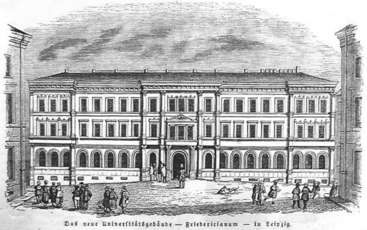 Das Fridericianum in Leipzig (Holzschnitt)